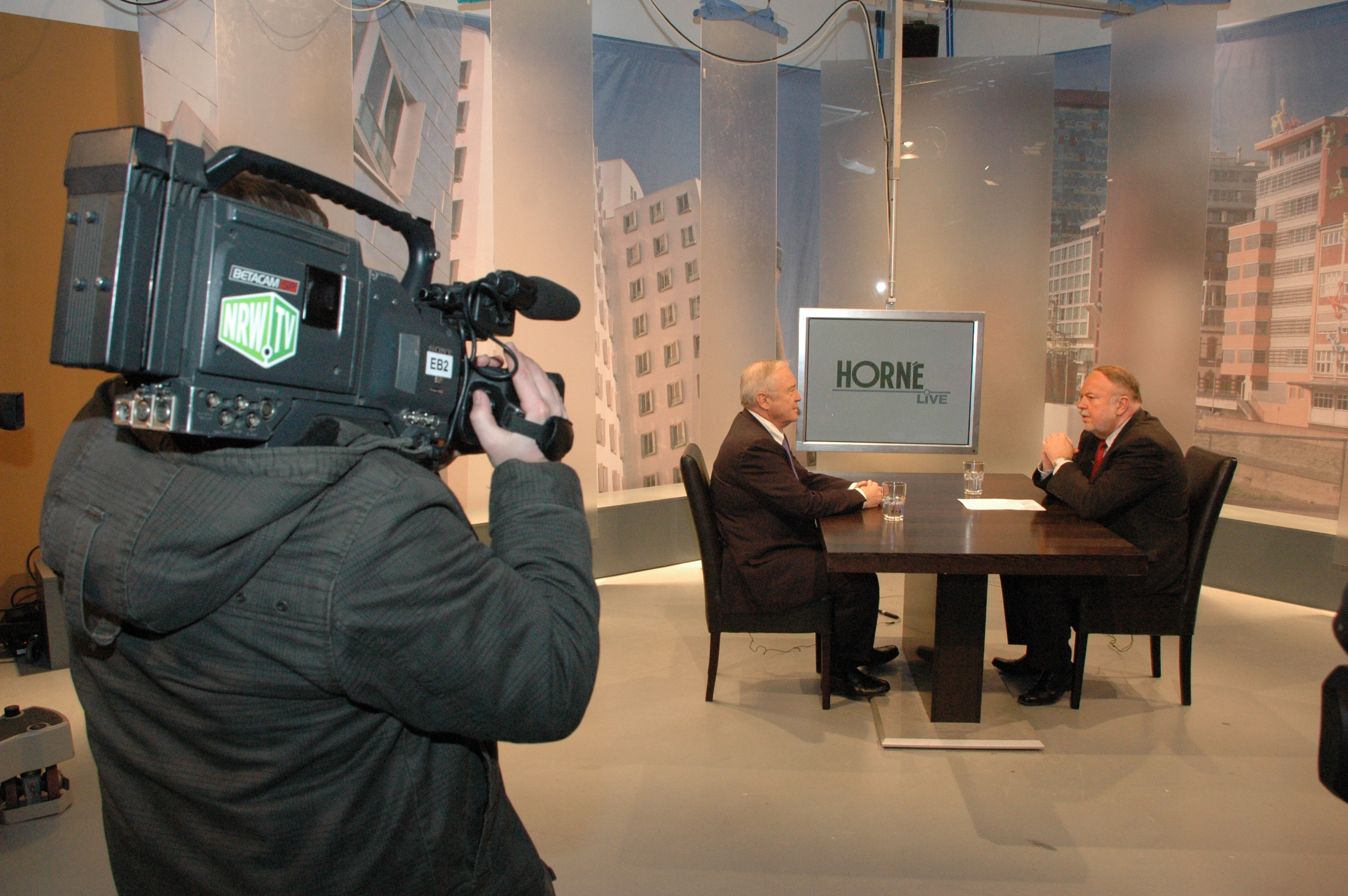 US-Botschafter* William R. Timken jr. (links) im Gespräch mit Roger Horné bei einer Sendung am 14. Februar 2008.